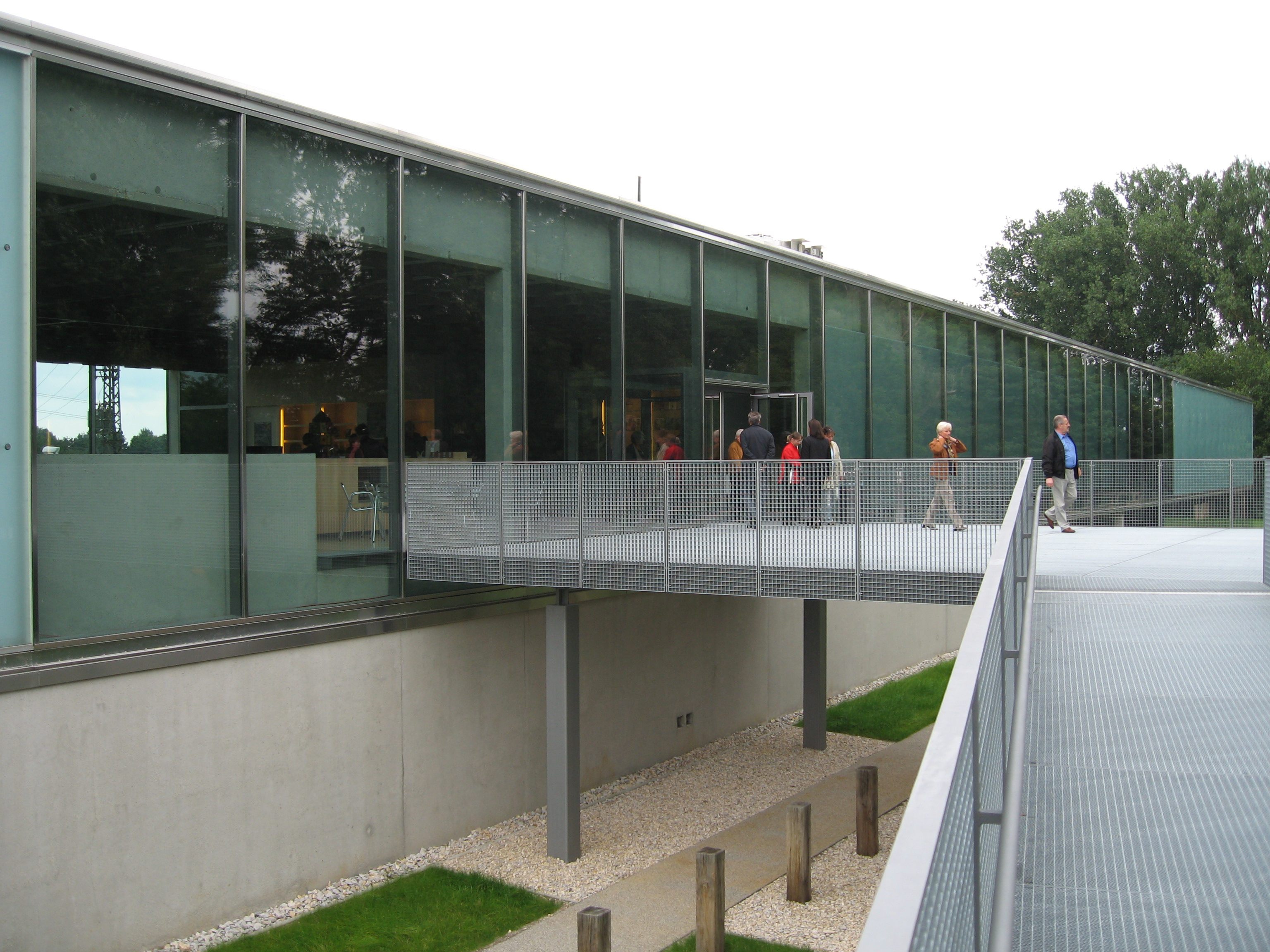 Eingangsbereich des Keltenmuseums in Manching